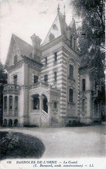 The Villa Castel in Bagnoles-de-l'Orne, Normandy